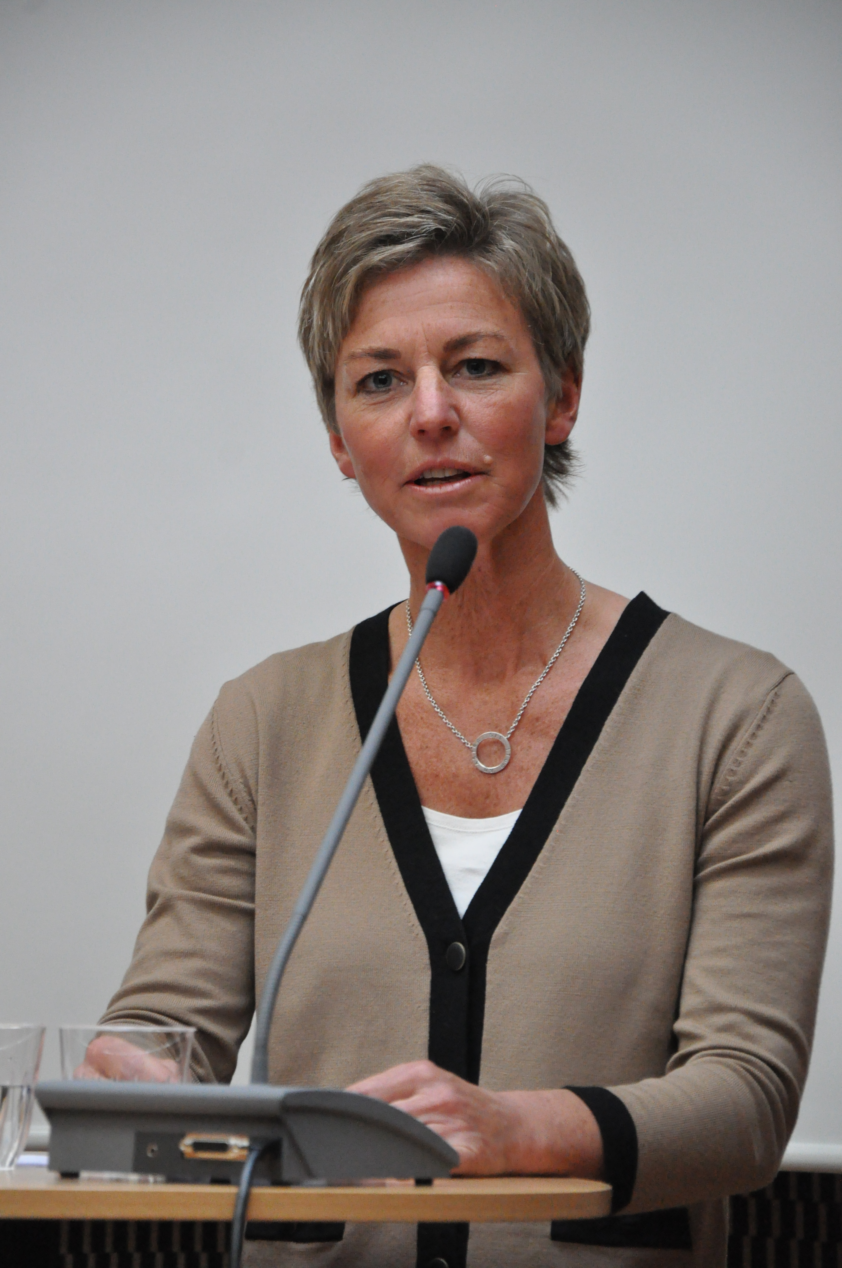 debatt om eu i ABF-huset